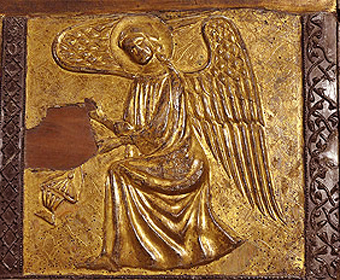 Detalle de la urna relicario de San Cándido procedente del monasterio de Sant Cugat del Valles (Barcelona) Datada 1292 Se conserva en el Museo Nacional de Arte de Cataluña